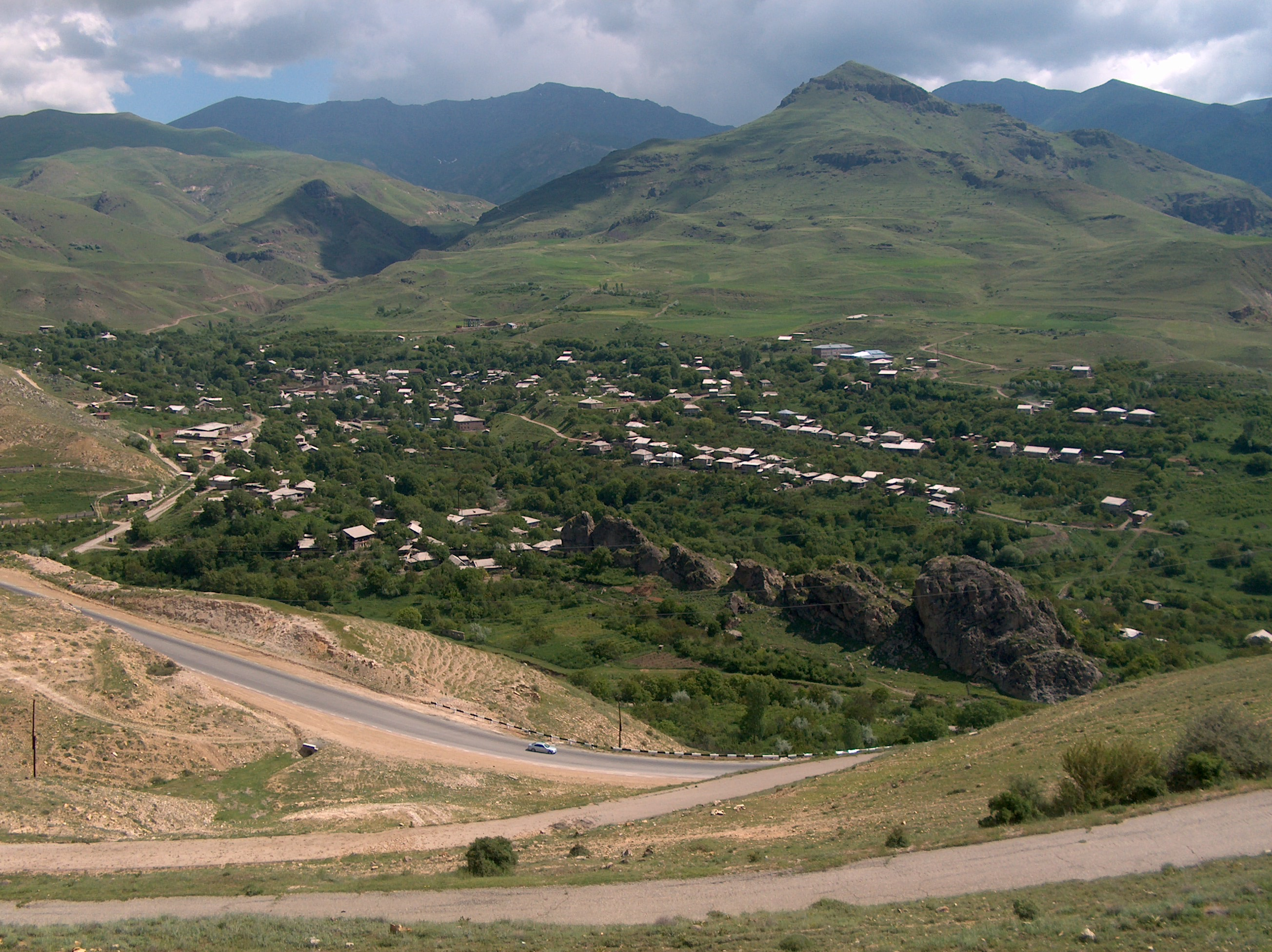 Yelpin, Vayots Dzor, Armenia.